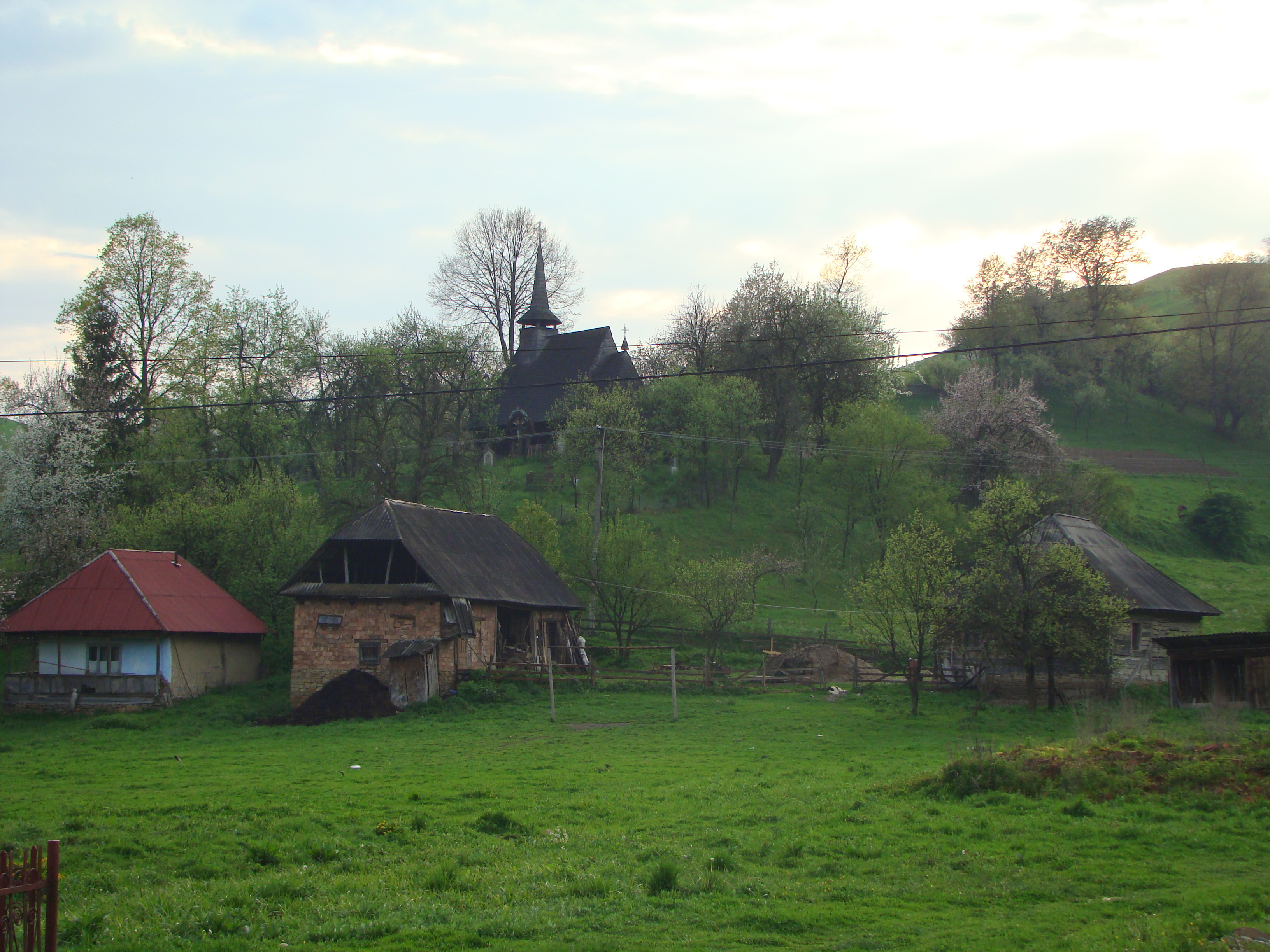 Biserica de lemn "Sfântul Dumitru", sat LARGA; comuna SUCIU DE SUS